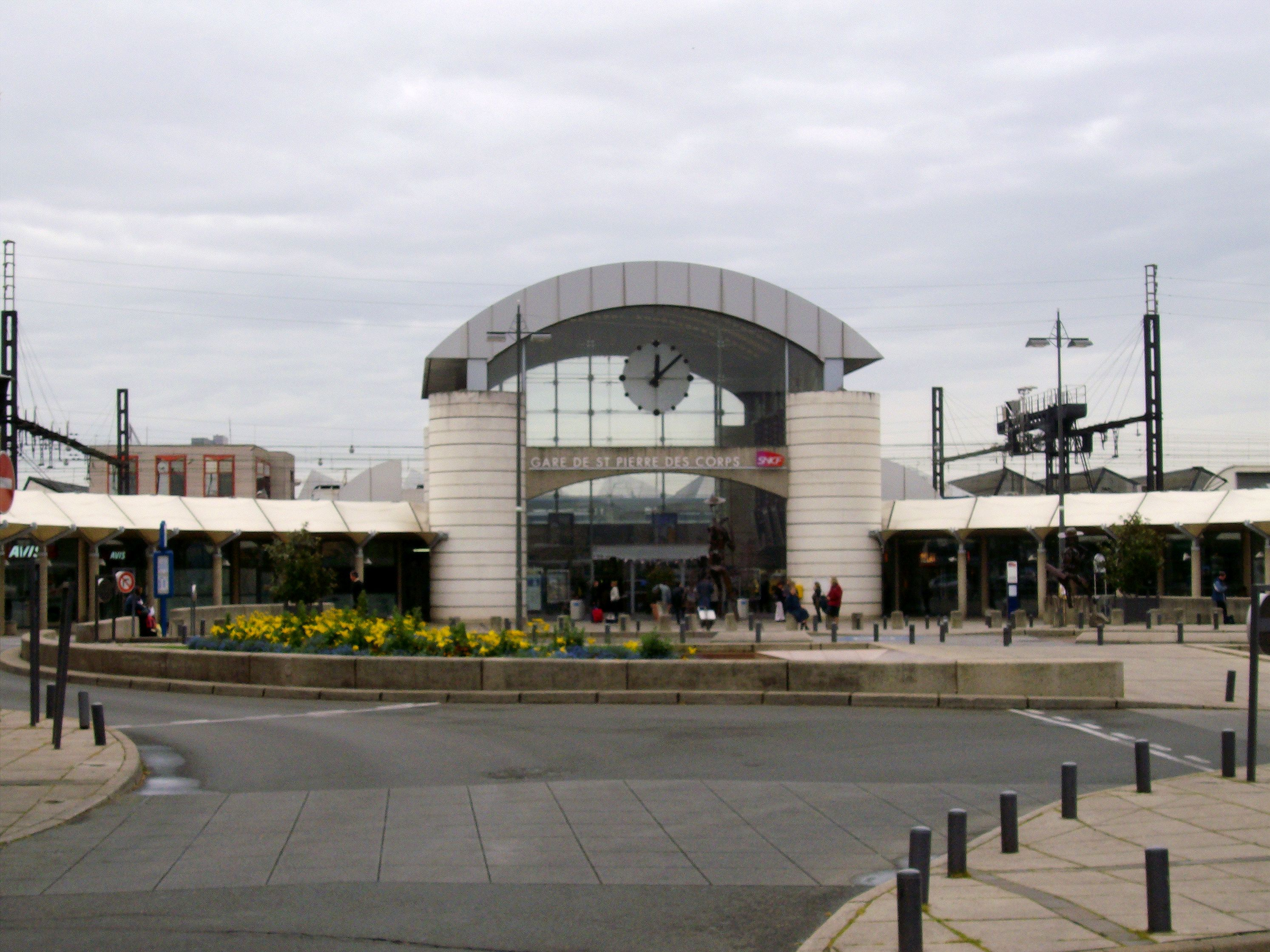 Gare de Tours / Saint-Pierre-des-Corps.